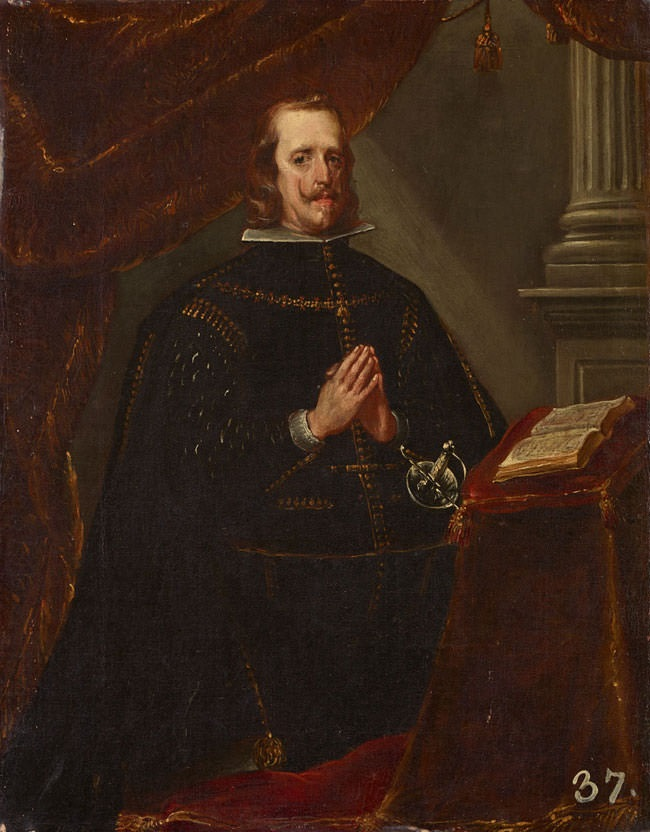 Retrato del rey Felipe IV de España (1600-1665), que aparece en actitud orante y arrodillado en un reclinatorio.